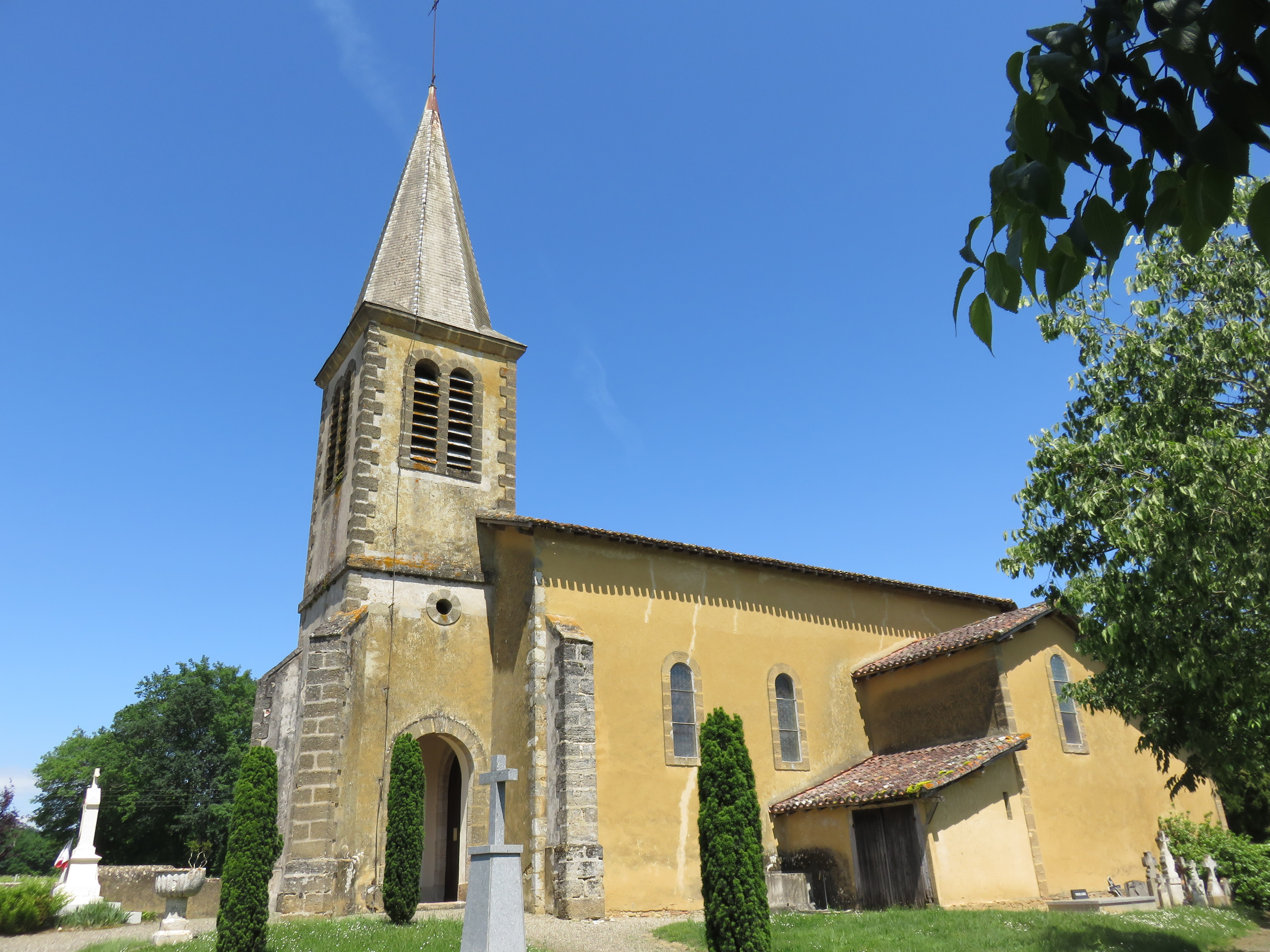 Église Saint-Martin de Réans (Gers, France).